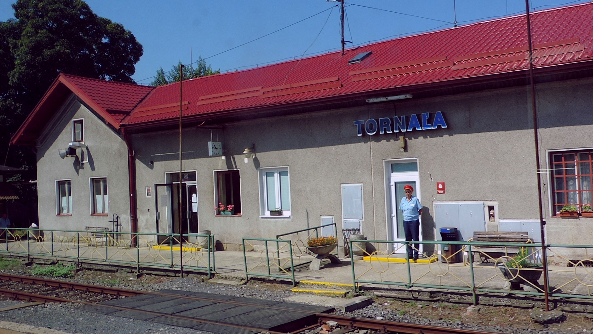 Tornaľa - železničná stanica